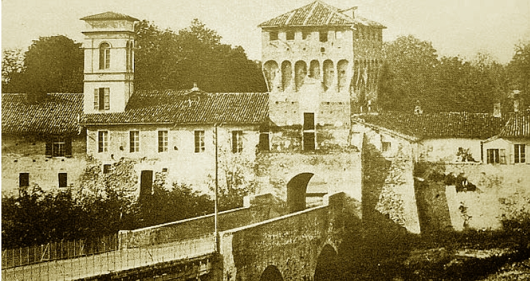 La porte qui sépare Parme au palais Ducal